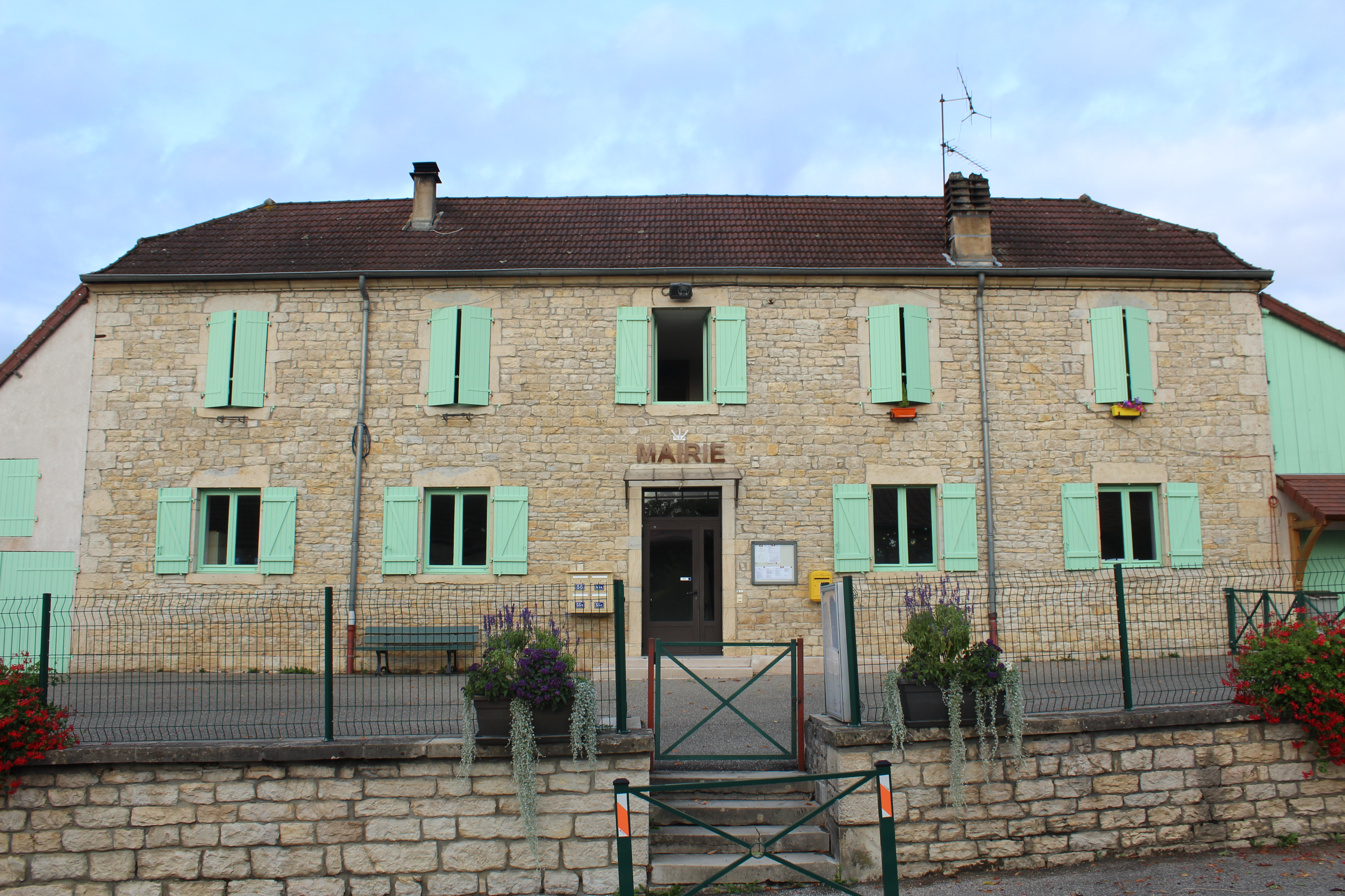 Mairie de Cosges.